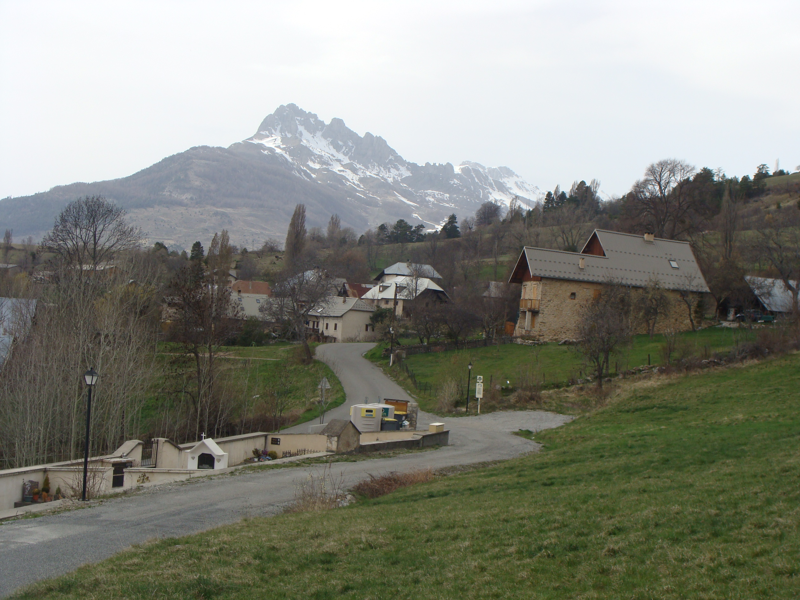 Vue partielle du village de Puy-Sanières (Hautes-Alpes). Au fond, les Aiguilles de Chabrières.